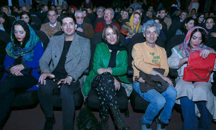 پانته‌آ بهرام در مراسم اکران خصوصی فیلم سینمایی «آینه بغل»